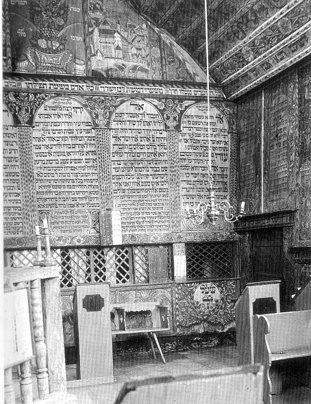 Innenansicht der Scheunensynagoge in Bechhofen (Mittelfranken)